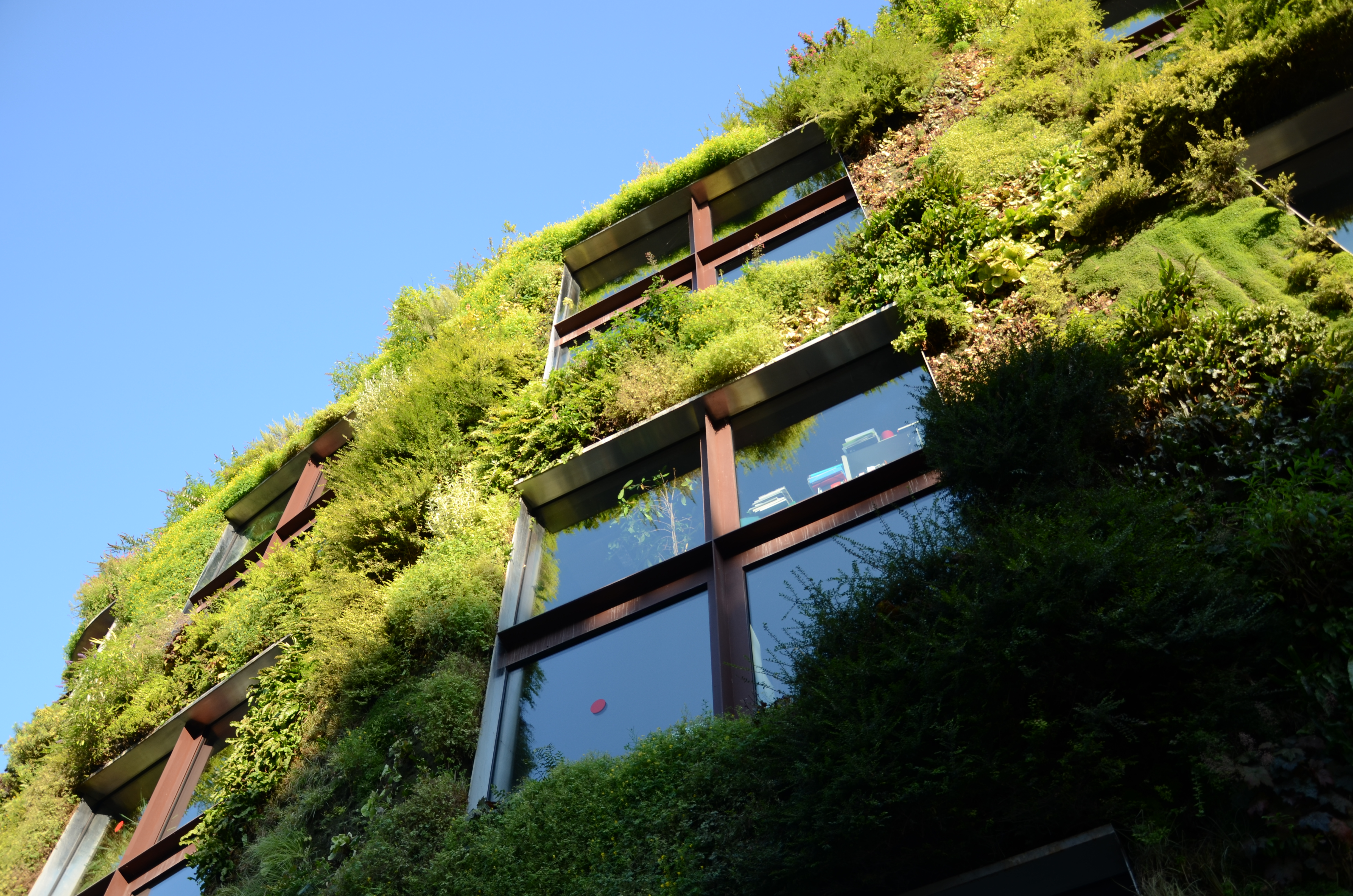 Klimplanten tegen een gevel in Parijs, 2014.